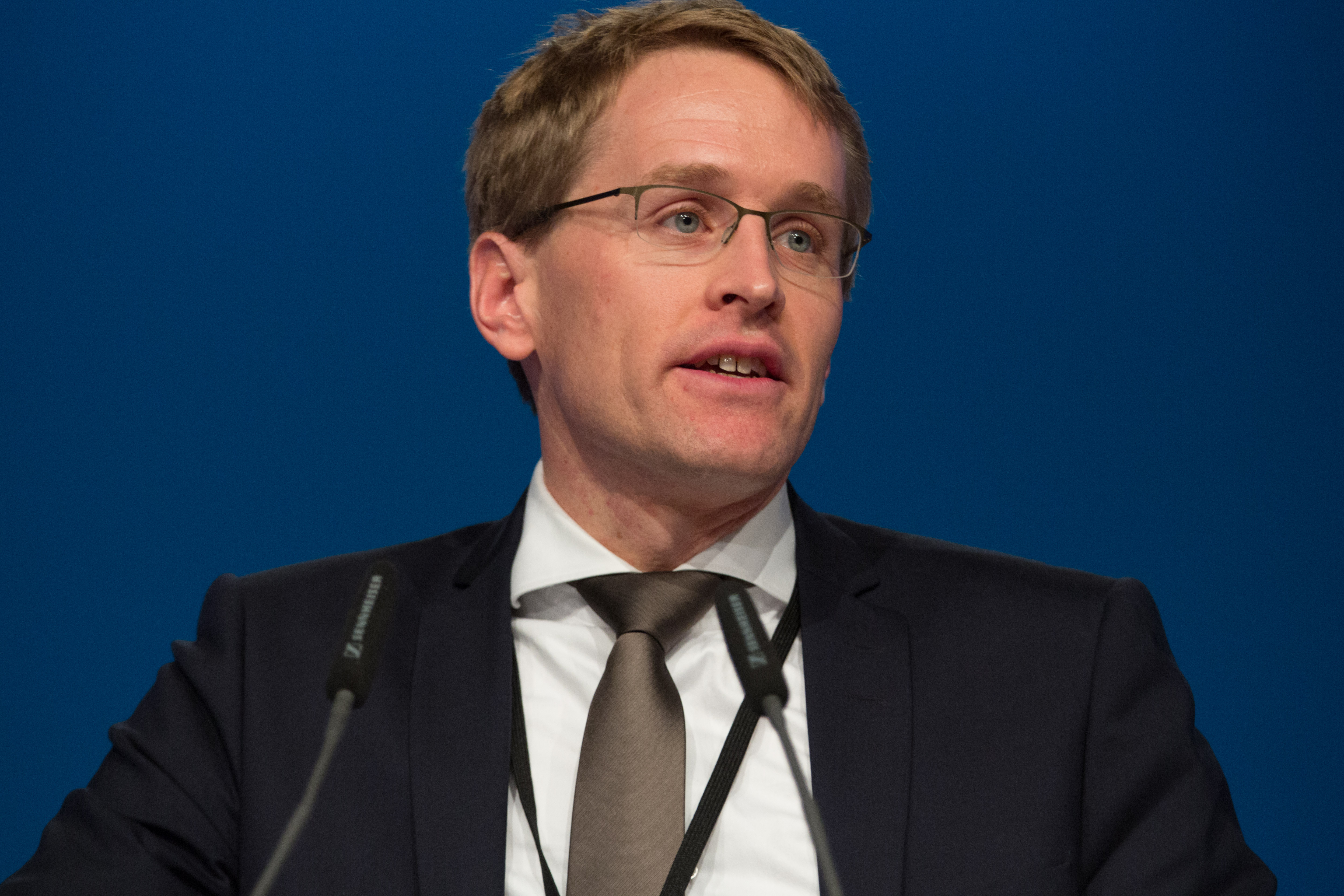 Daniel Günther, Vorsitzender der CDU Landtagsfraktion SchleswigHolstein auf dem 29. Parteitag der CDU Deutschlands am 6. Dezember 2016 in Essen, Grugahalle